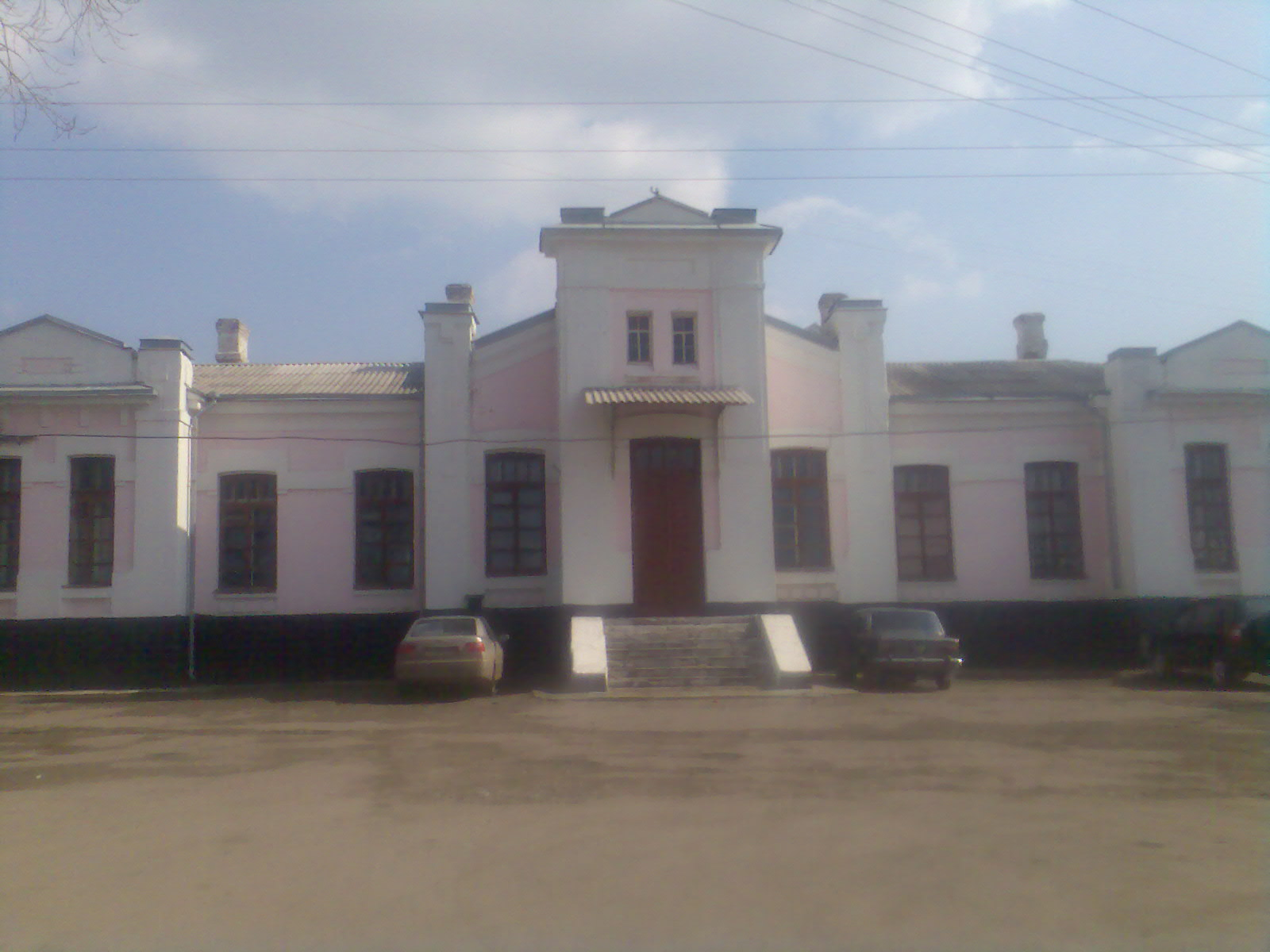 Золочів (станція, Південна залізниця)